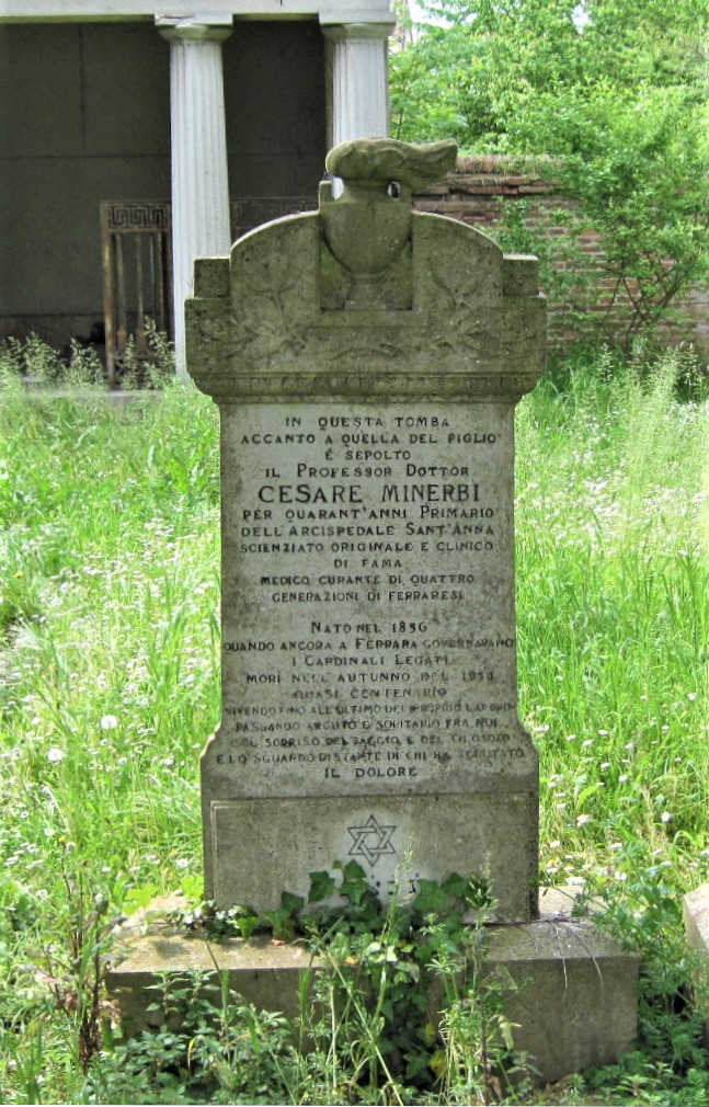 Tomba del dottor Cesare Minerbi, primario dell'ospedale Sant'Anna per quarantanni e nonno materno di Giorgio Bassani.